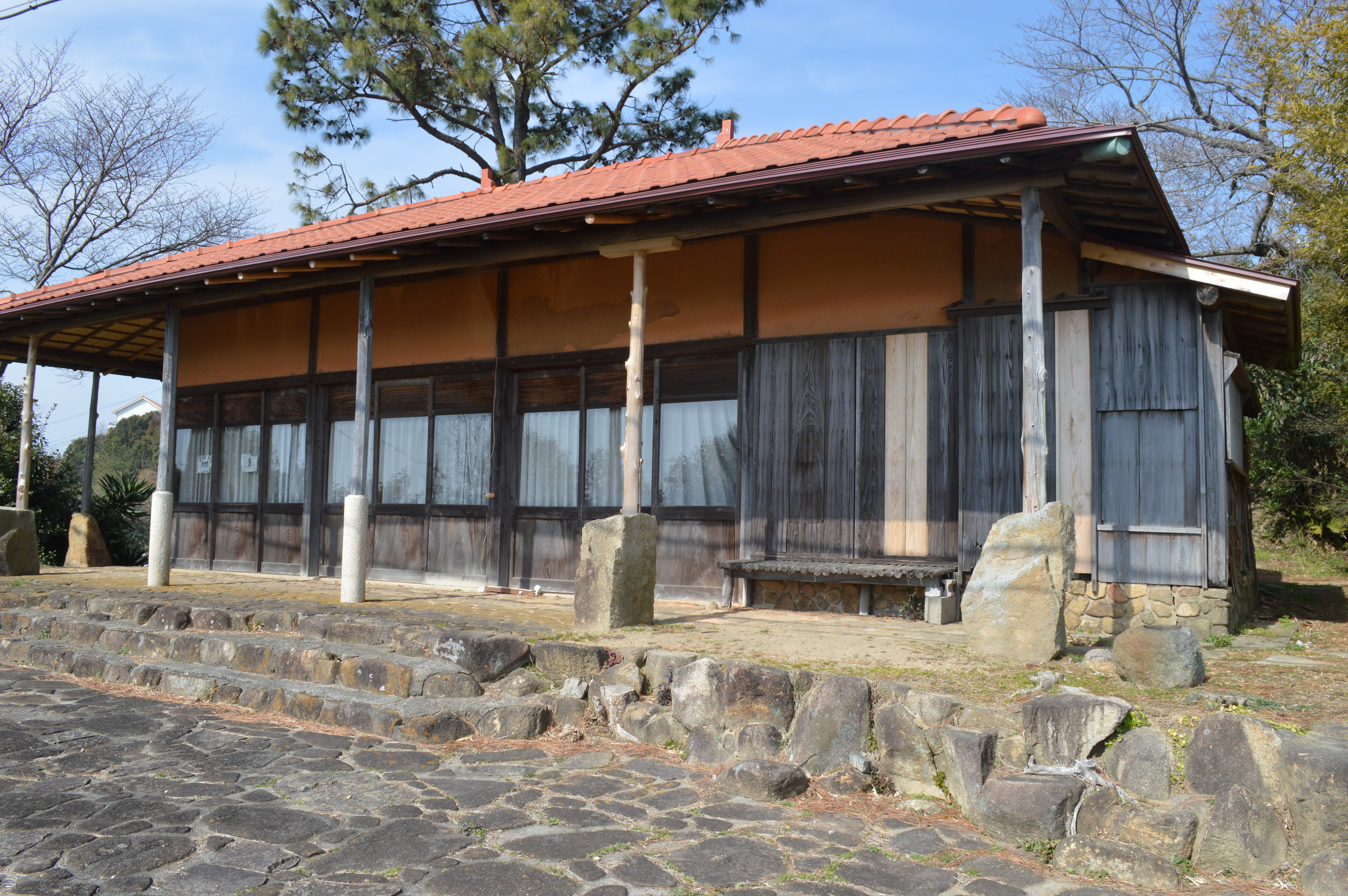 岡山県牛窓（現・瀬戸内市）の牛窓オリーブ園にある洋画家佐竹徳のアトリエ